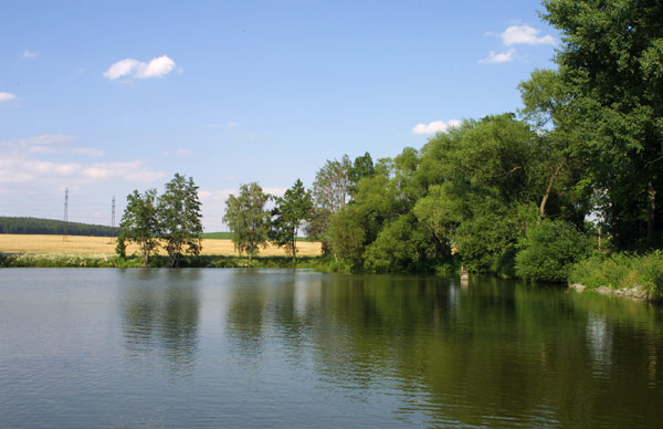 Hráz a severní břeh Týneckého rybníka. Autor: Adam Hauner Datum: 4. 7. 2005